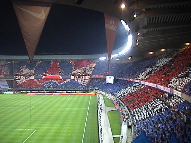 Le parc des princes un jour de match avant le plan Leproux.